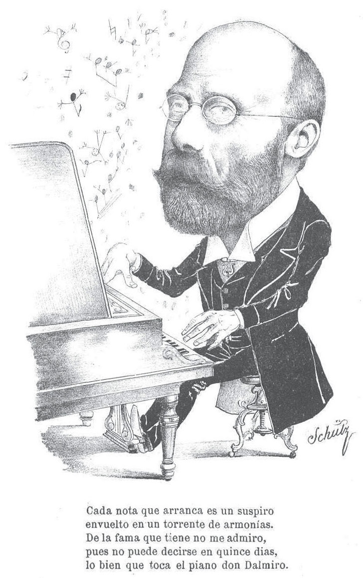 Caricatura de Dalmiro Costa por Charles Schütz